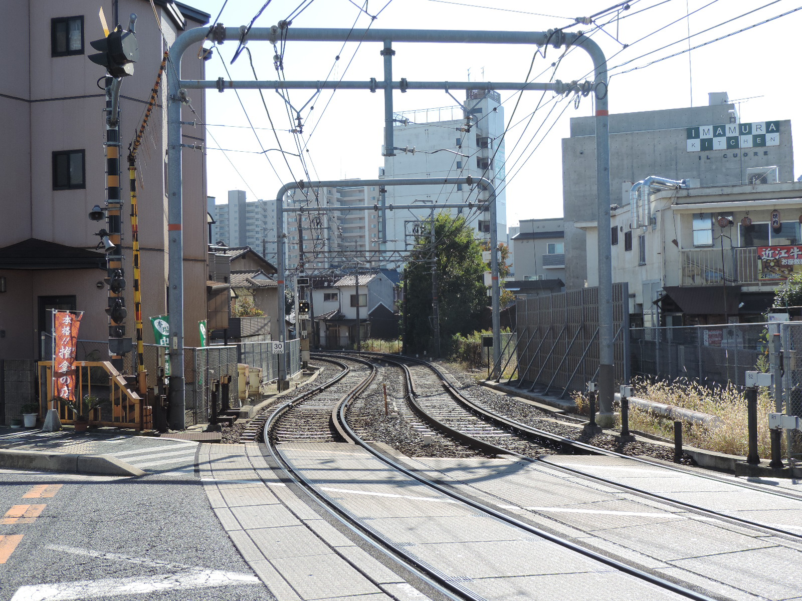 2006年まで石山寺寄りに京阪石山駅が存在した。 （2017年撮影）